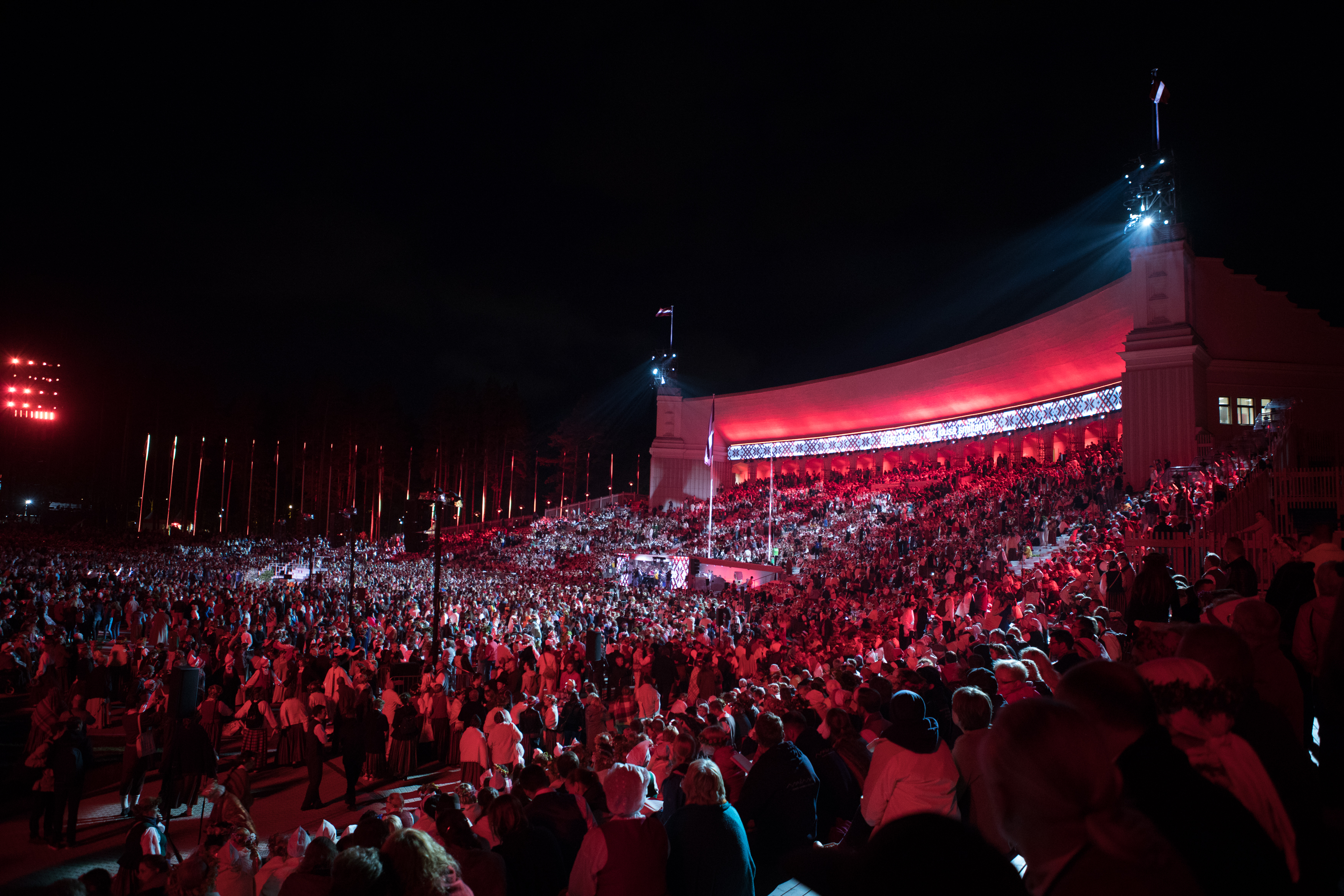 2018.gada 8.jūlijs. Dziesmu un deju svētku noslēguma koncerts „Zvaigžņu ceļā”. Foto: Ernests Dinka, Saeima Izmantošanas noteikumi: saeima.lv/lv/autortiesibas